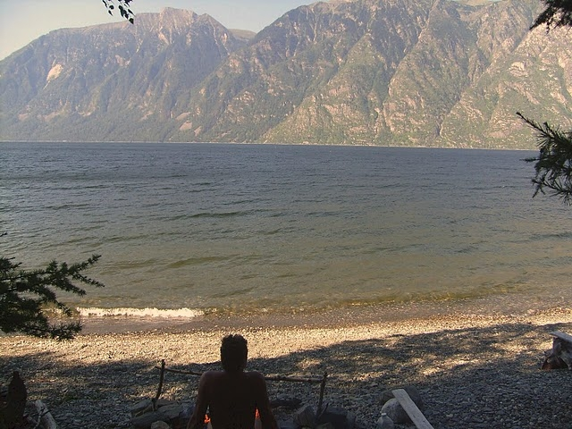 Вечером у костра на озеро. Август 2008.